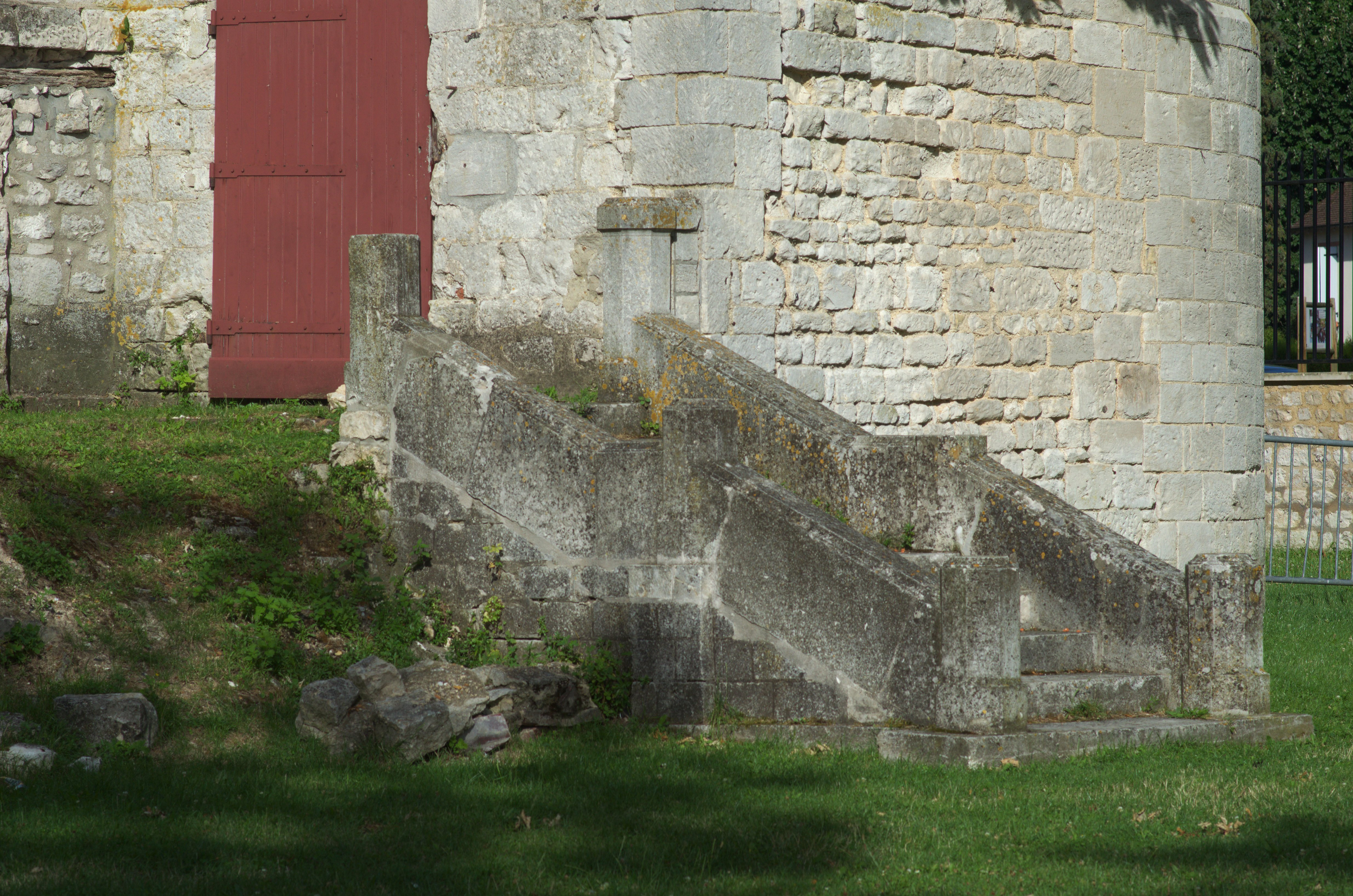 Château des Tourelles, édifice du XIIe siècle - Vernon, Eure, France. Un escalier (tardif).